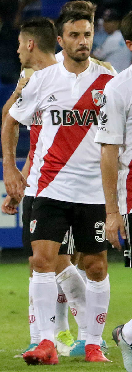 Guayaquil, jueves 19 de abril del 2018 (Andes).-En el estadio Capwell, Emelec enfrenta a River Plate, en partido del grupo D de la Copa Libertadores.Foto:César Muñoz/Andes